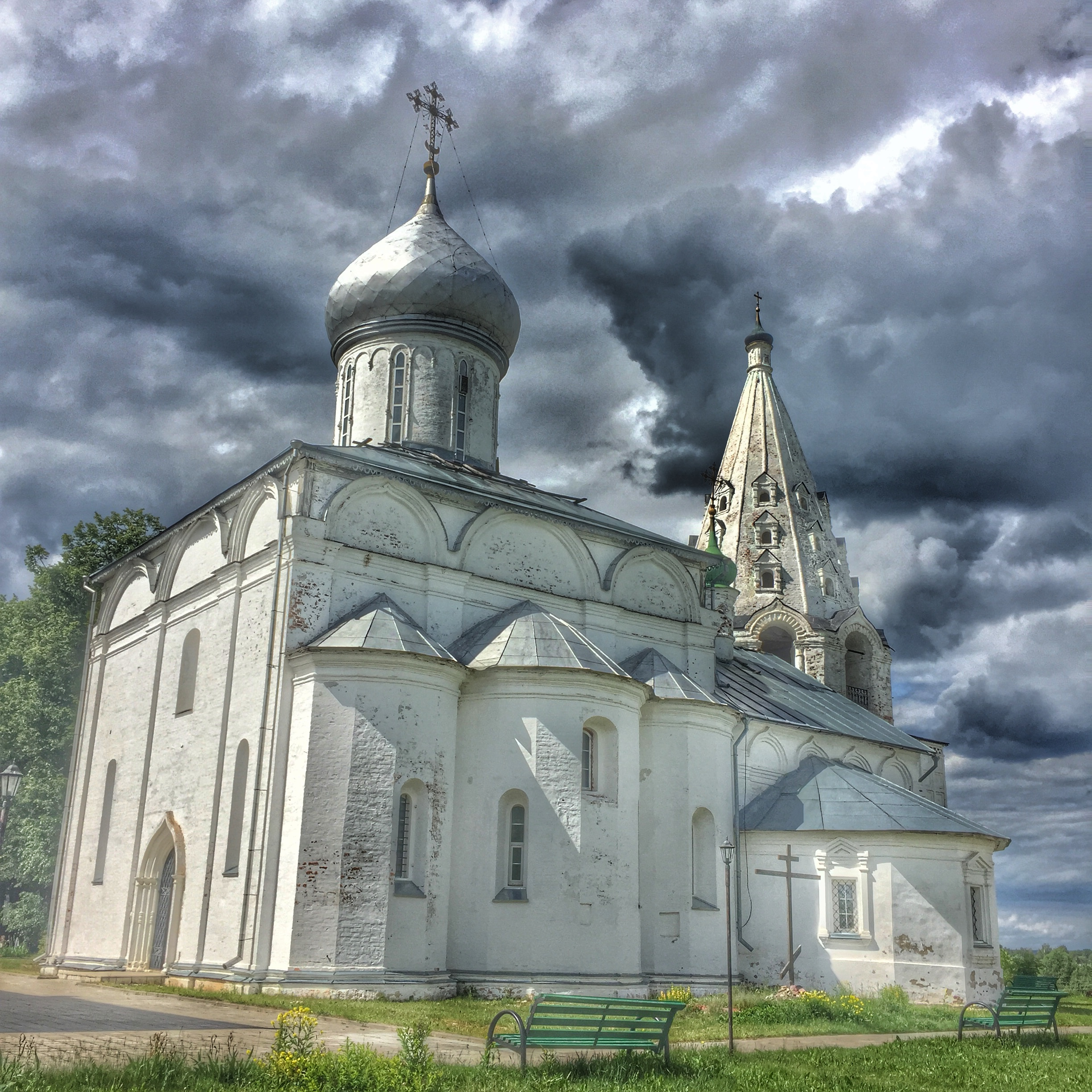 Troitse-Danilov Monastery